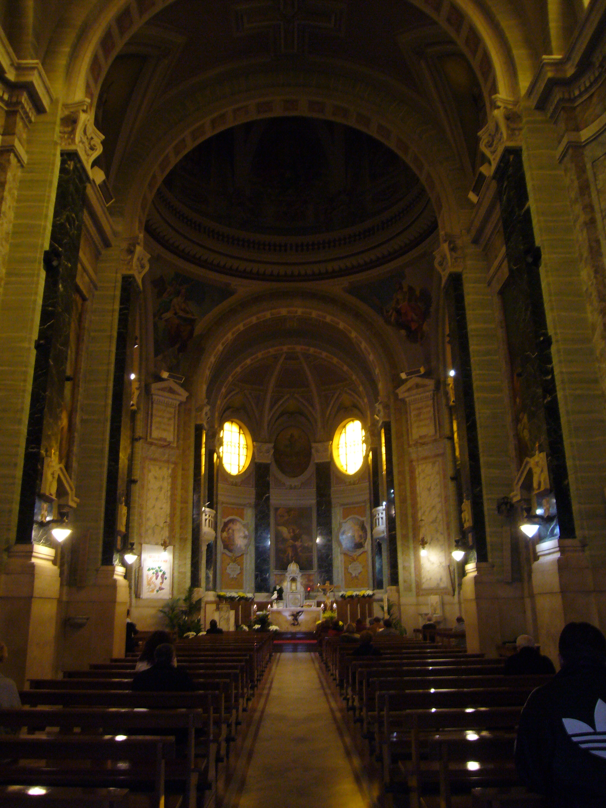 Roma, chiesa dei ss. Angeli custodi a piazza Sempione. Interno.